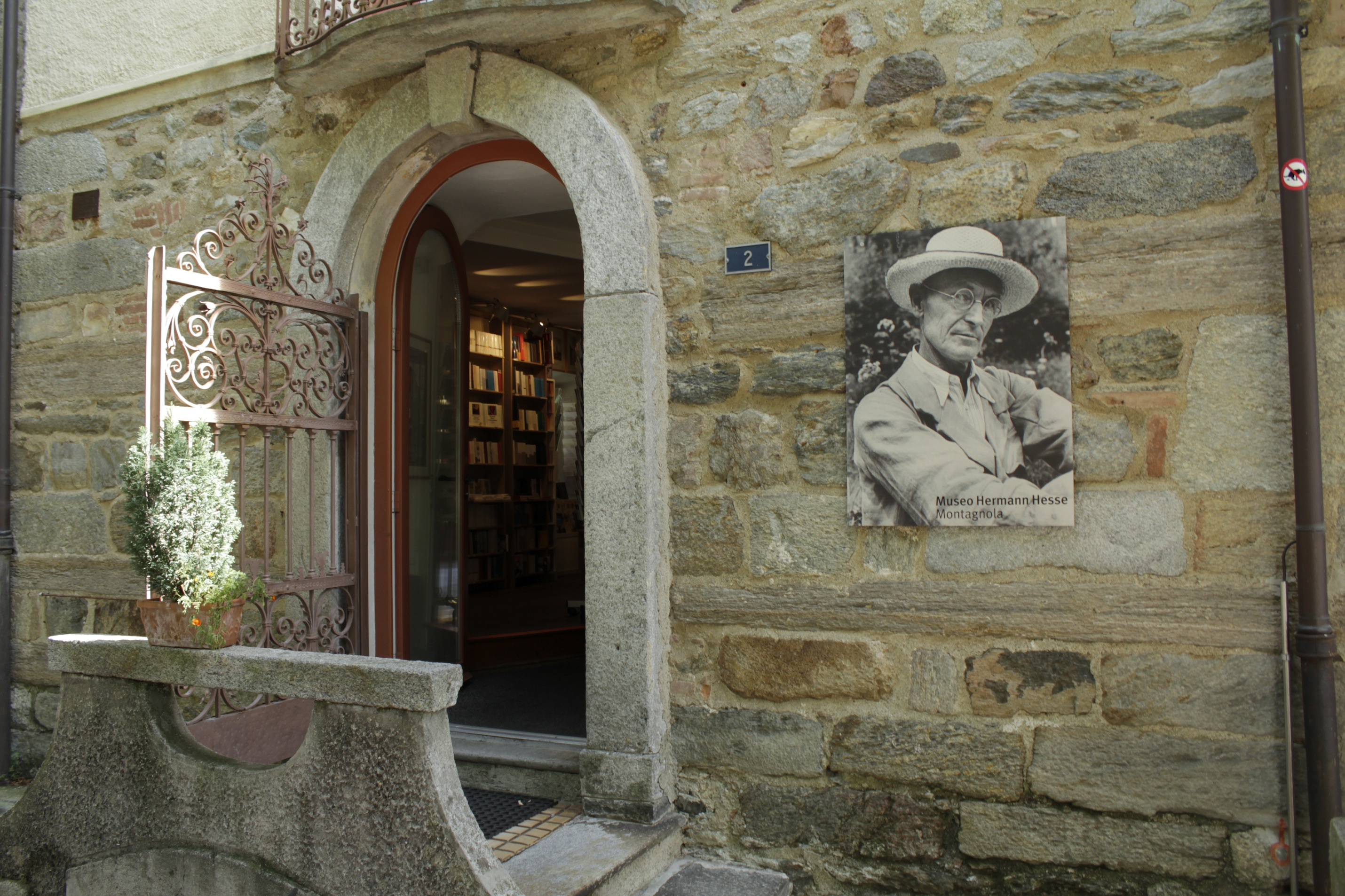 Eingang zum Hermann Hesse Museum in Montagnola/Tessin